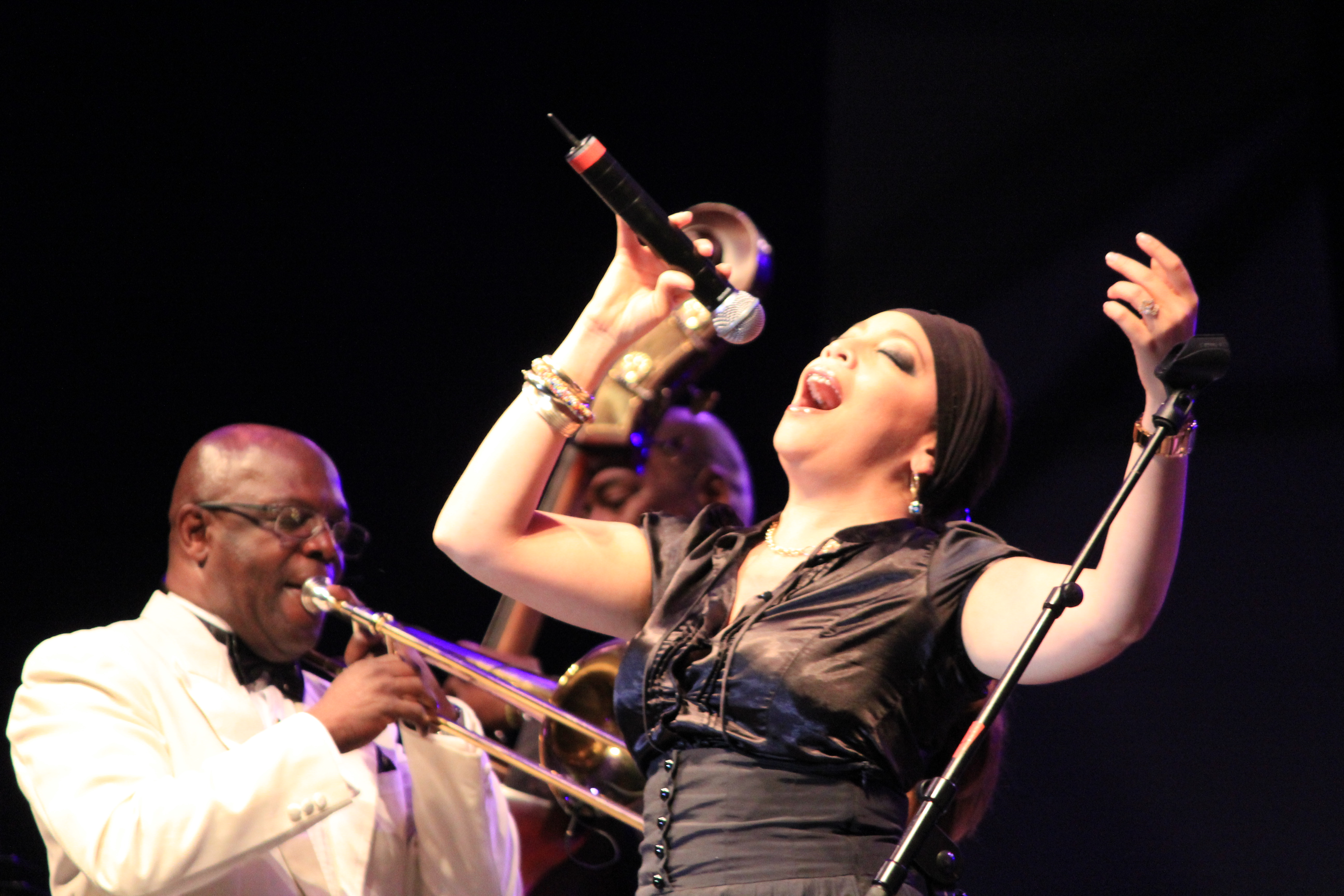 Orquesta Buena Vista Social Club pendant le Festival interceltique de Lorient